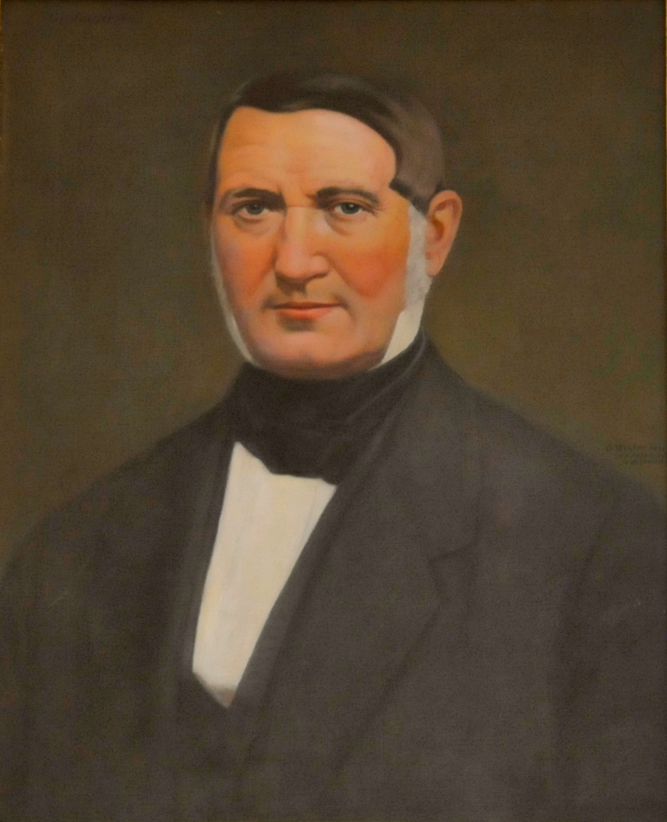 Porträt von Gustav Hopf im Deutschen Versicherungsmuseum